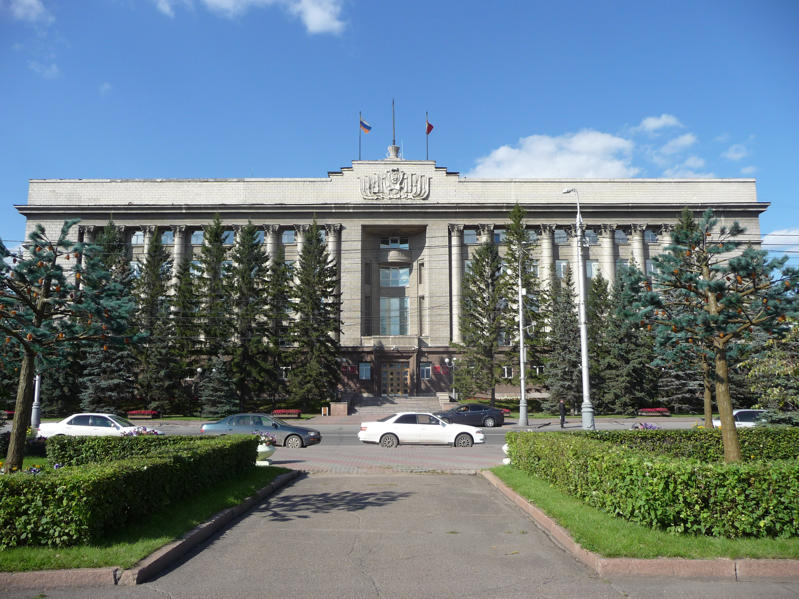 Здание правительства Красноярского края